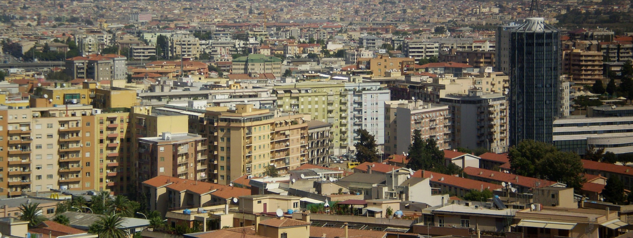 Cagliari - Zona Fonsarda